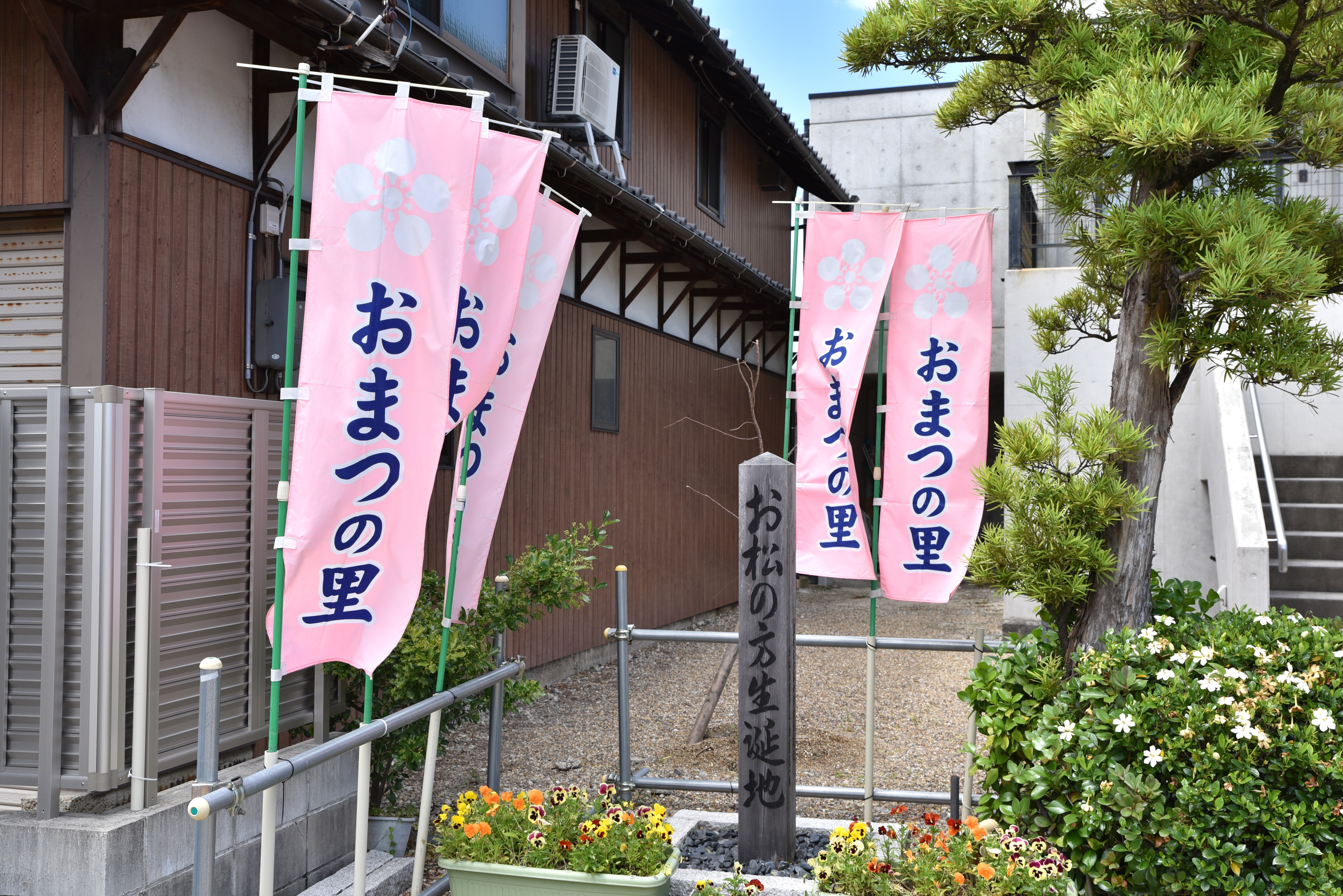 芳春院の生誕地 Nikon D750